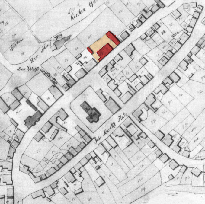 Plan von Vorsfelde von 1771 mit Sitz des Amtes Vorsfelde